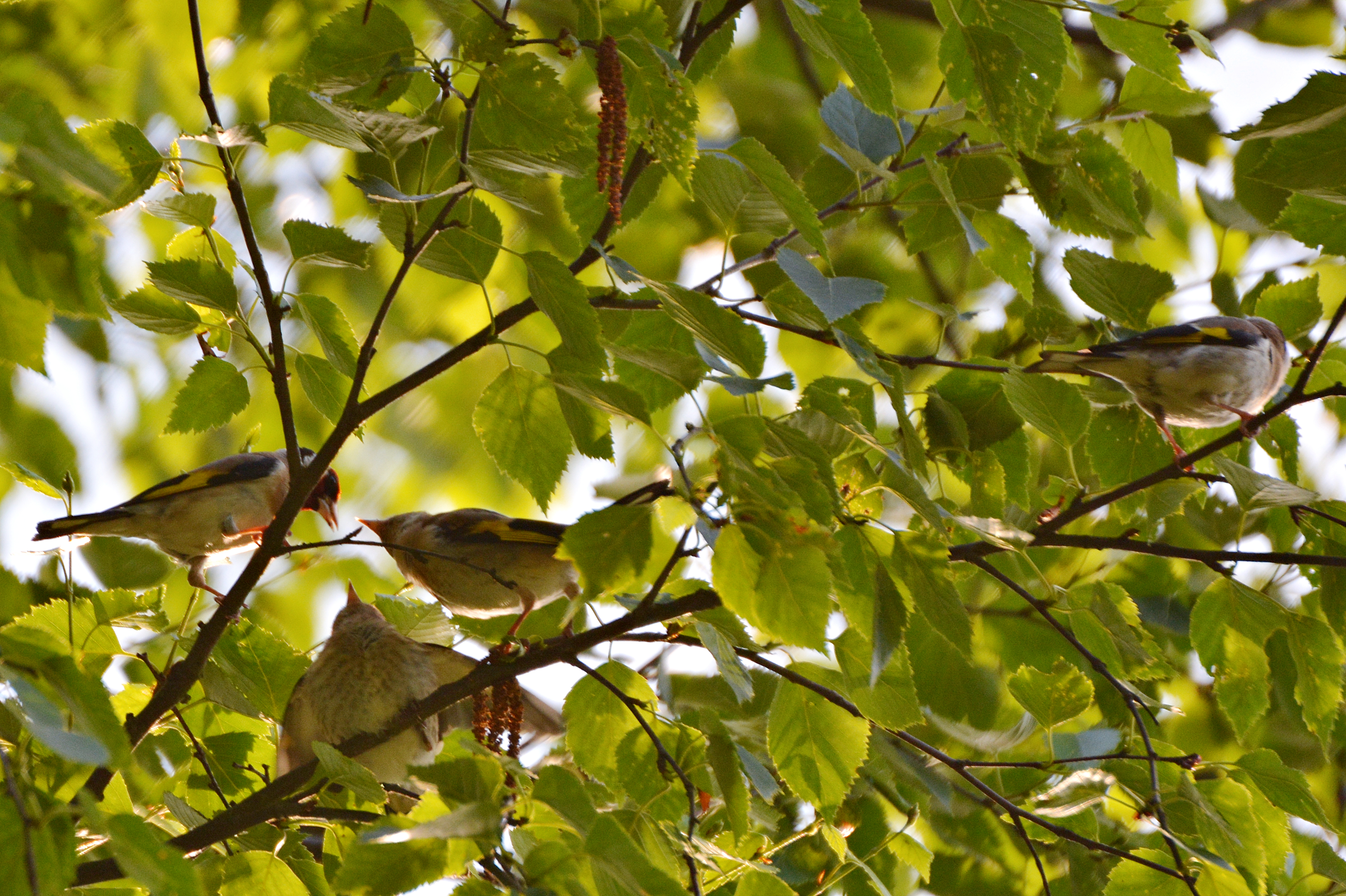 Fütterung juveniler Stieglitze